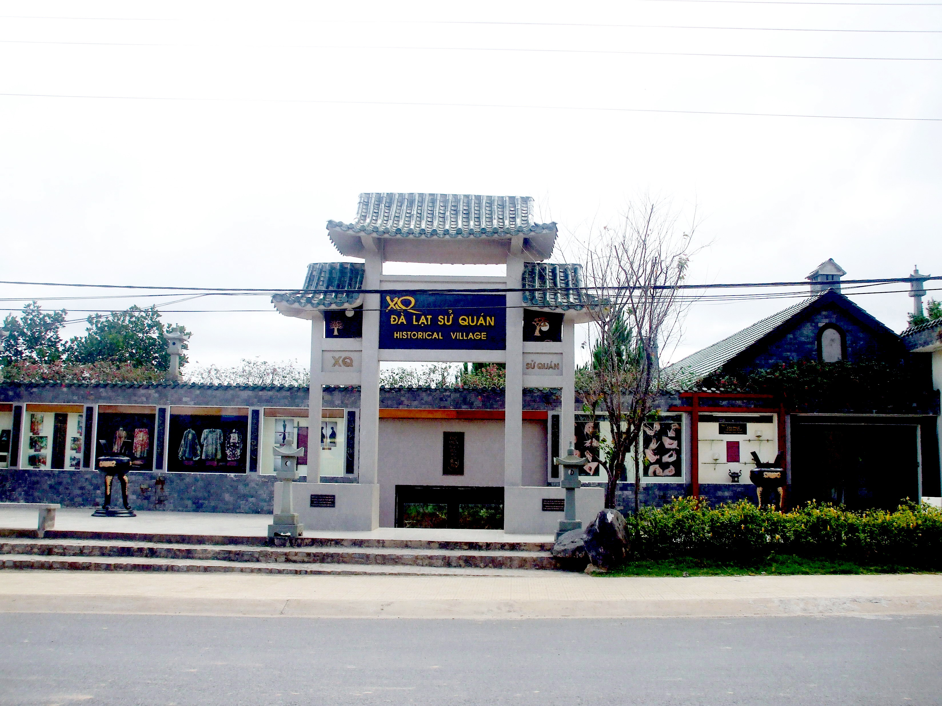 X-Q sử quán hay tranh thêu tay X-Q tọa lạc tại địa chỉ 258 Đường Mai Anh Đào - thành phố Đà Lạt thuộc tỉnh Lâm Đồng, Việt Nam. Nơi đây giới thiệu nghề thêu tay truyền thống của Đà Lạt.